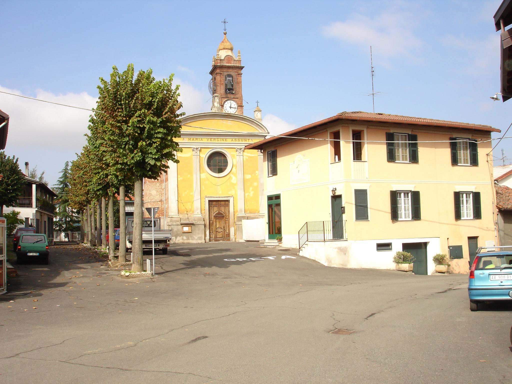 Autore: Tony Frisina